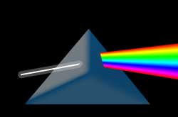 El Laser es un rayo de luz amplificado mediante la emisión estimulada de radiación.